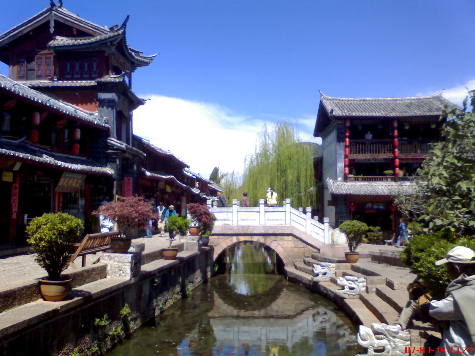 古城小桥流水